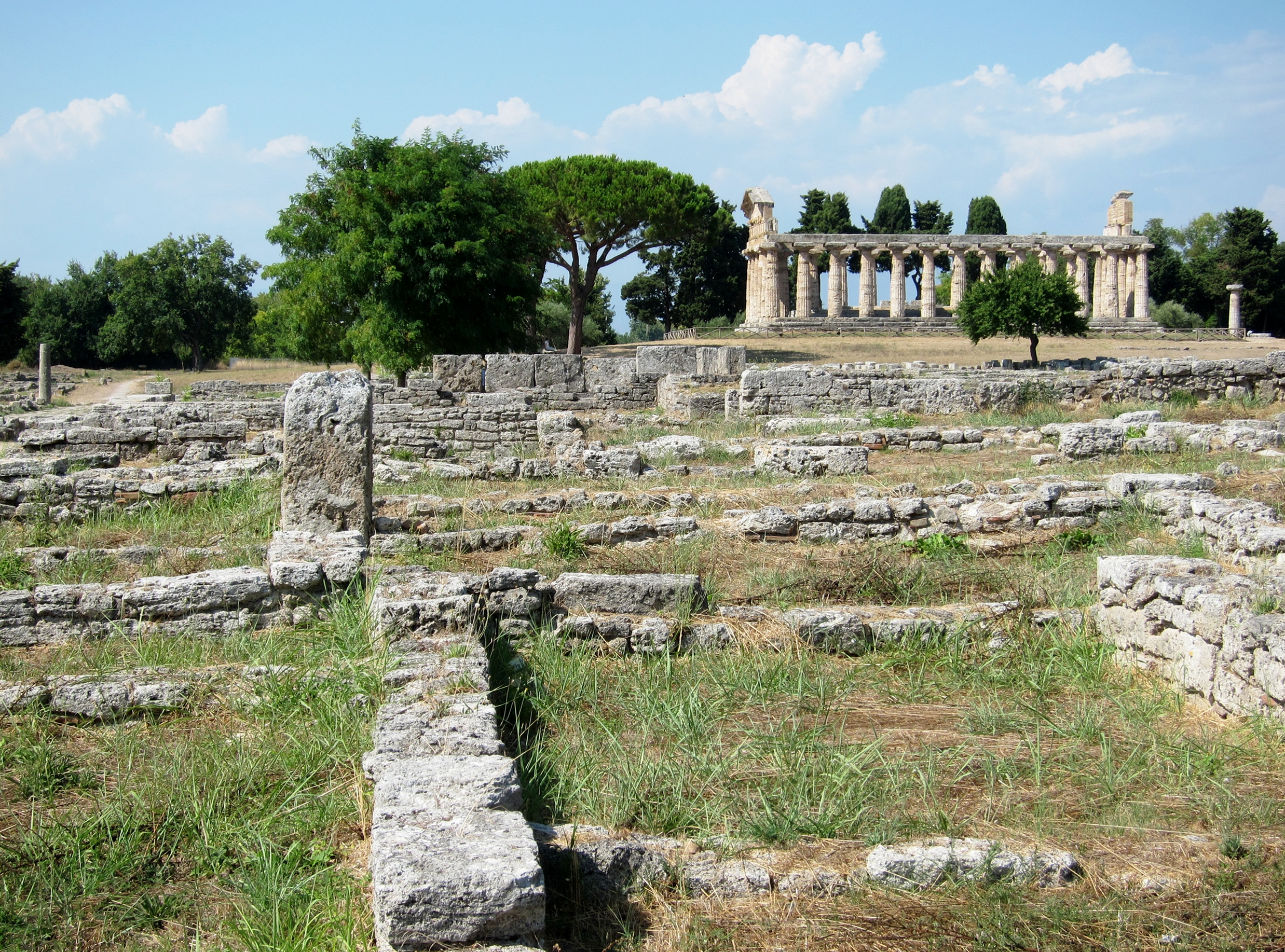 Vue du site de Paestum (Italie) en direction du temple de Cérès (ou d'Athéna).